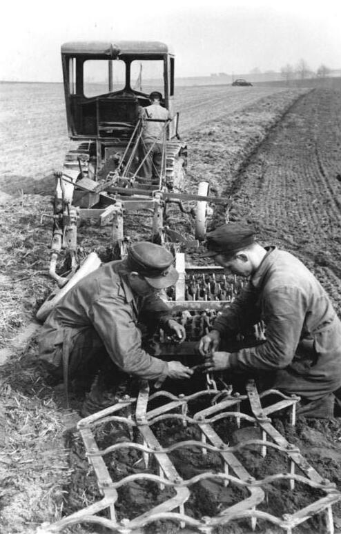 Schlöben, Traktorist beim Pflügen Zentralbild Richter 31.3.1953 Frühjahrsbestellung in der Deutschen Demokratischen Republik Brigadeleiter Schütze und der Traktorist Aktivist Horst Zigarski von der MTS Schlöben beim Koppeln von Geräten für die Frühjahrsbestellung auf einem Feld der Genossenschaft Gernewitz. Traktorist Zigarski erhielt die Auszeichnung "Für hervorragende Leistungen im Fünfjahresplan". Er ist zur Zeit der beste Traktorist in der Gesamtleistung der Jugendbrigade der MTS.